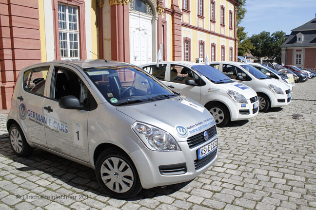 Stromos German E-Cars. Aufgenommen während der Bertha Benz Challenge 2011 im ehrenhof des Schlosses Bruchsal